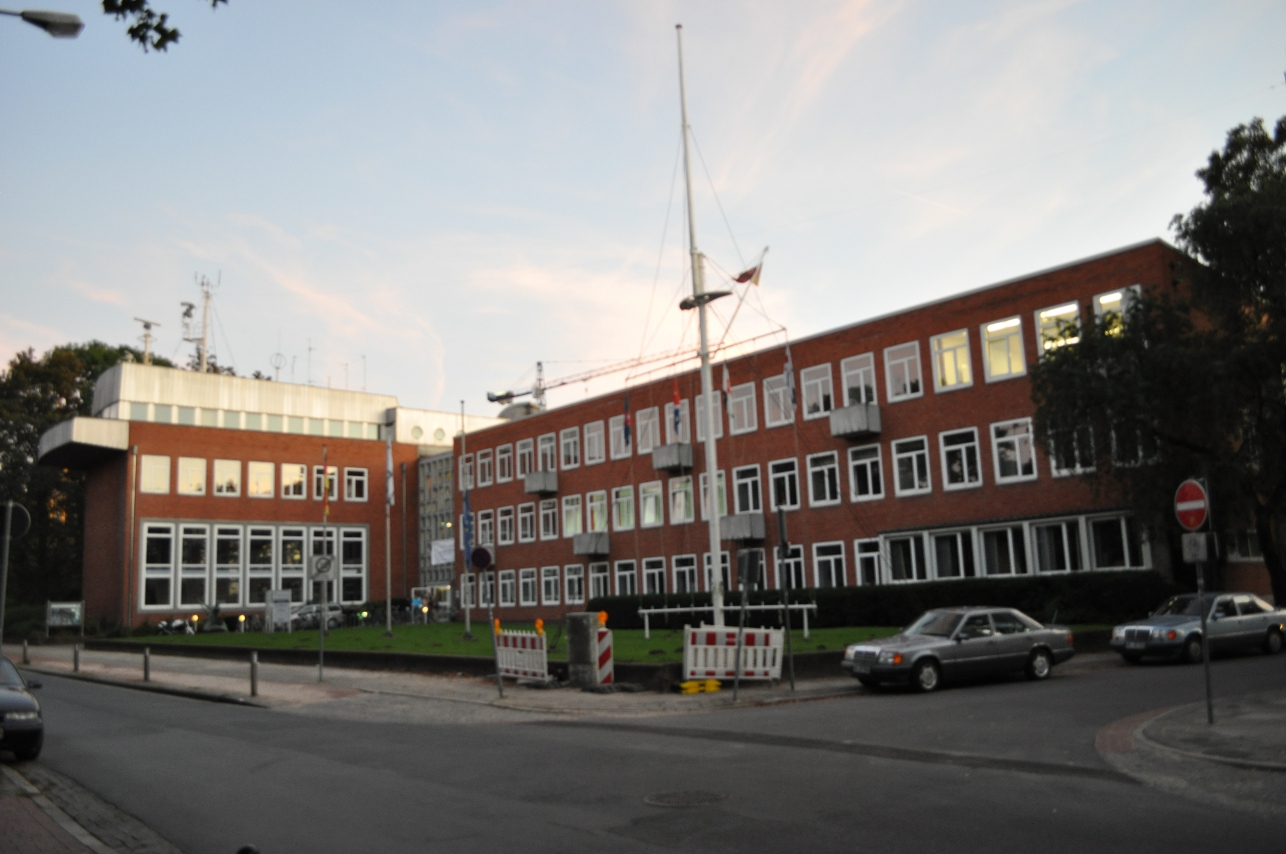 Hochschule für Nautik, Lehrgebäude in Bremen, Werderstraße 73.Das abgebildete Objekt ist ein geschütztes Kulturdenkmal in der Freien Hansestadt Bremen, mit der Nr. 1450 beim Landesamt für Denkmalpflege registriert.